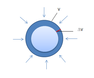 Bola Pejal yang mendapat tegangan hidrolik seragam dari suatu cairan dan volumenya menciut sebesar ∆V.